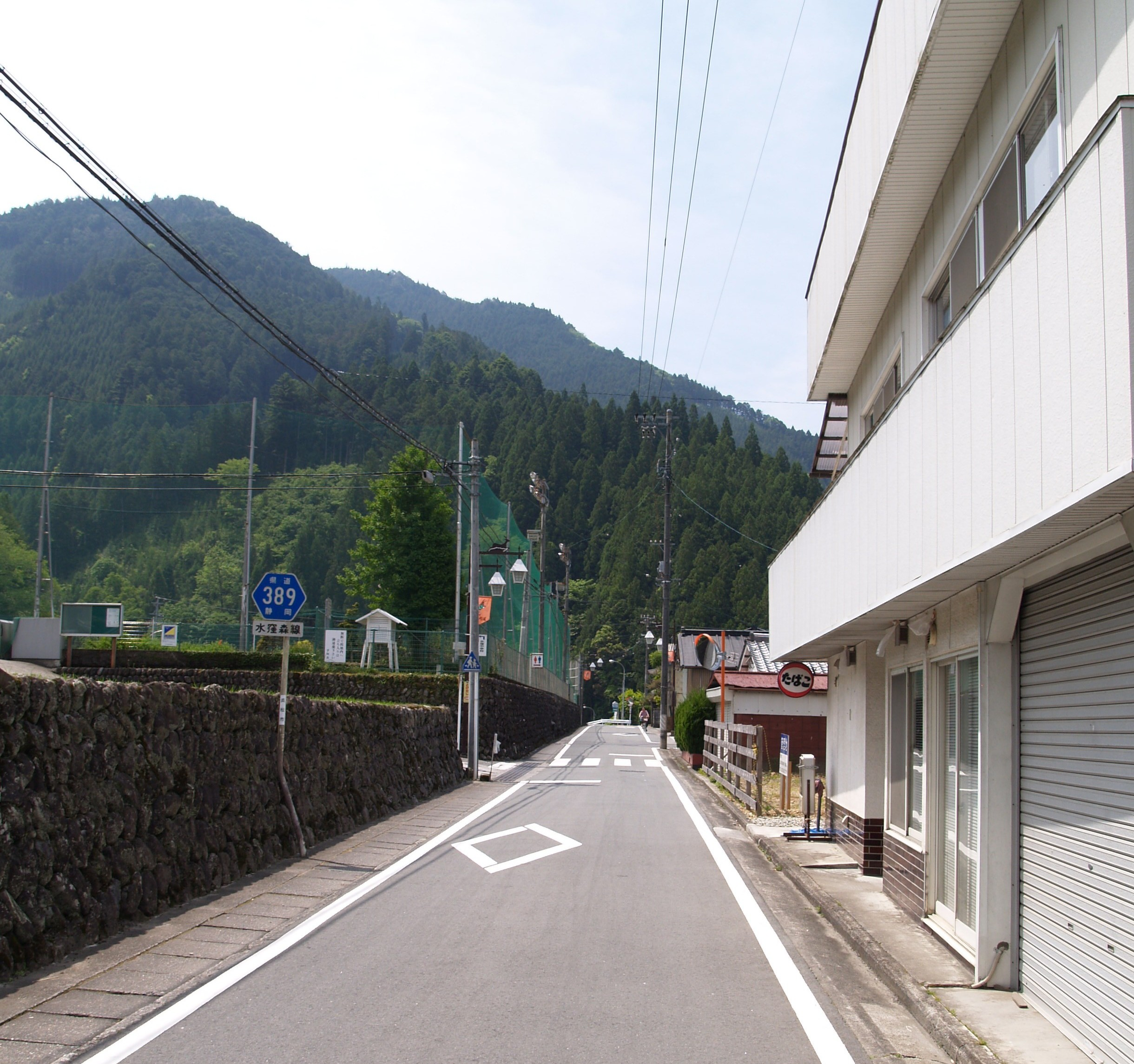 静岡県道389号水窪森線（向市場駅付近にて）